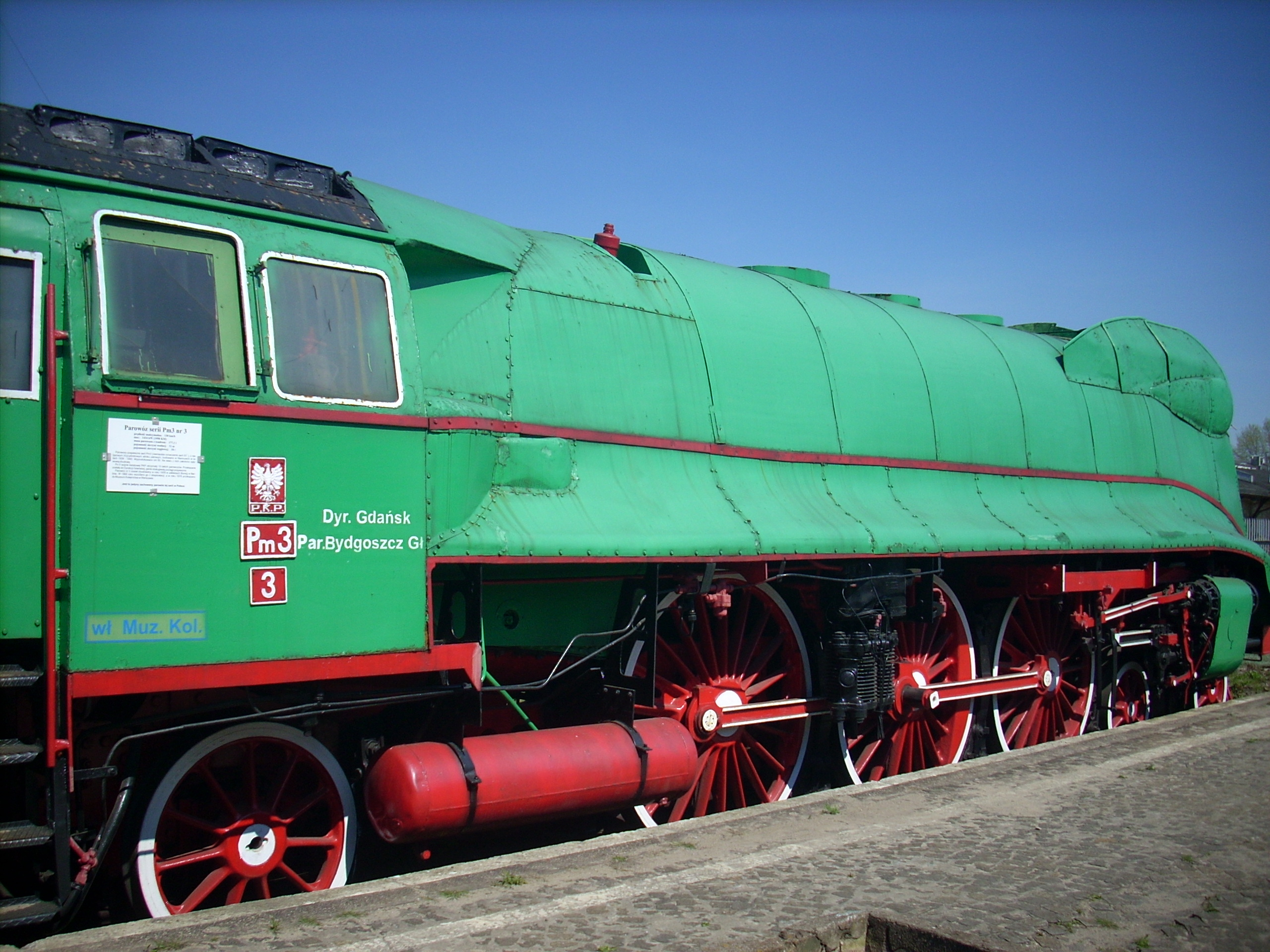 Lokomotywa Pm3-3 w Muzeum Kolejnictwa w Warszawie